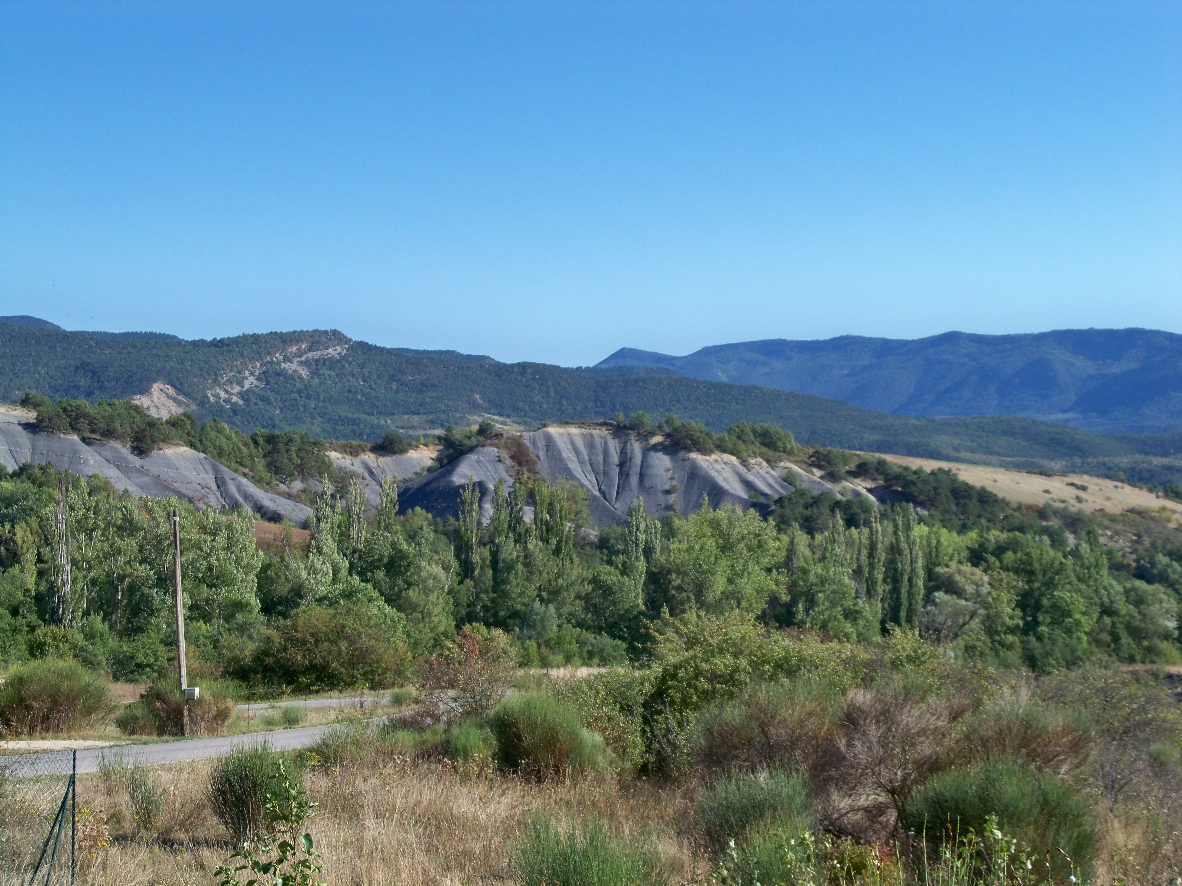 Marnes grises près de Rosans